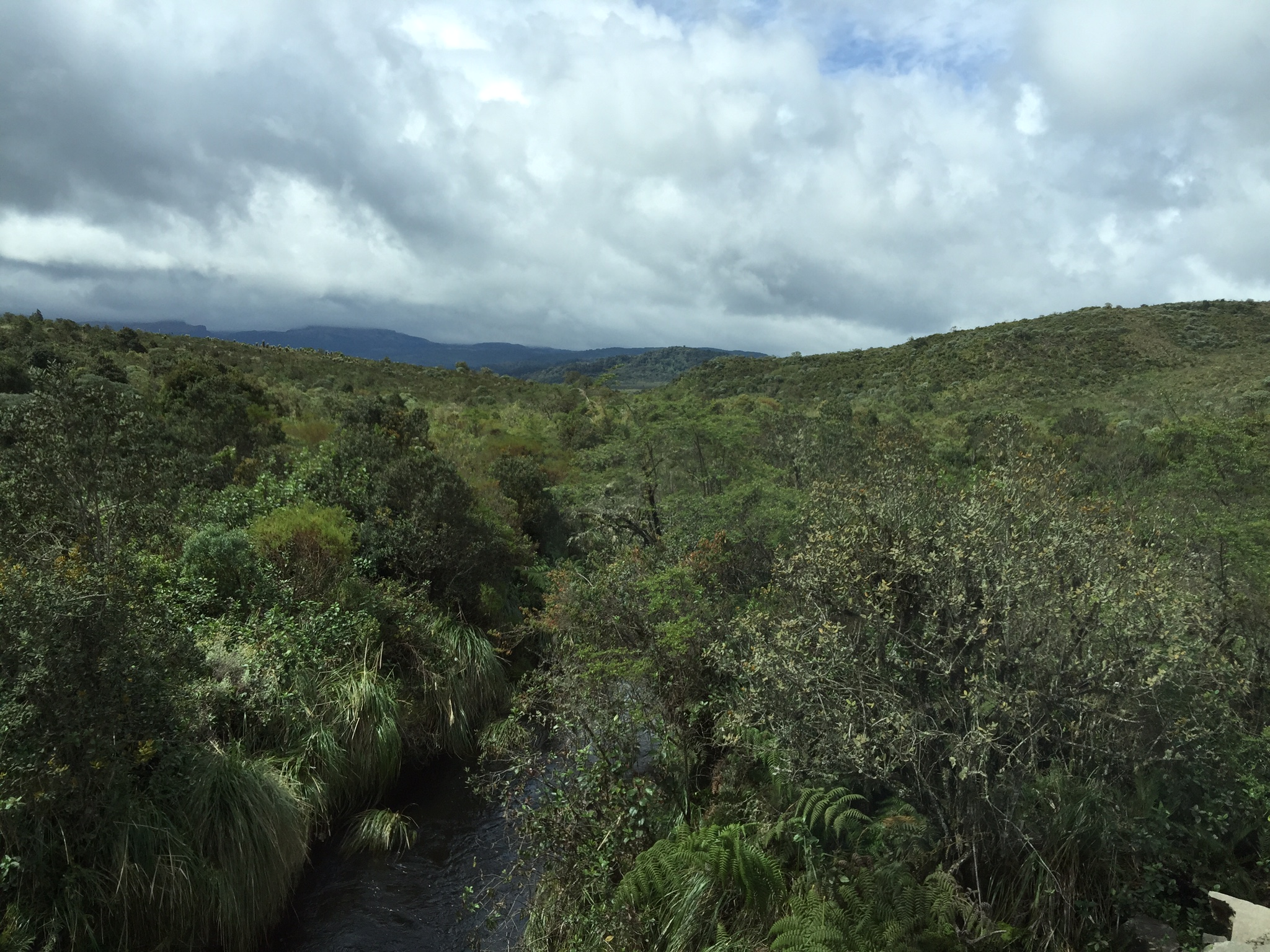 Situado en Colombia, más exactamente en la cordillera Central entre los departamentos de Cauca y Huila.